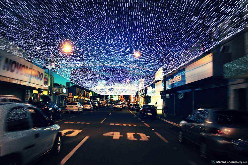 Catalão